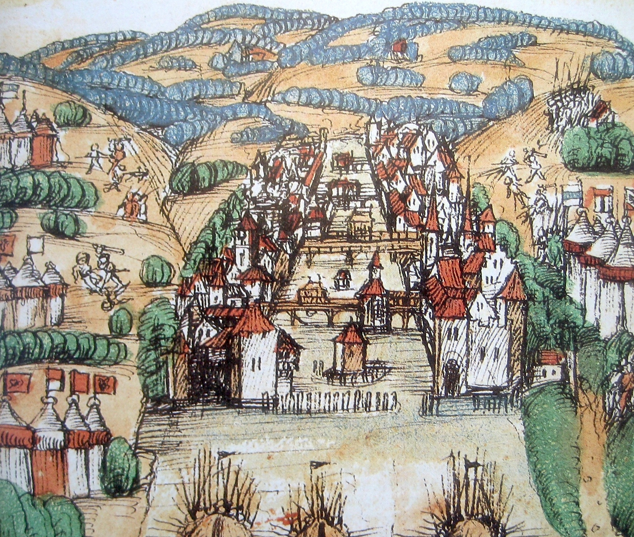 Belagerung von Zürich durch die Eidgenossen im Alten Zürichkrieg. Zeichnung von Gerold Edlibach, um 1488.